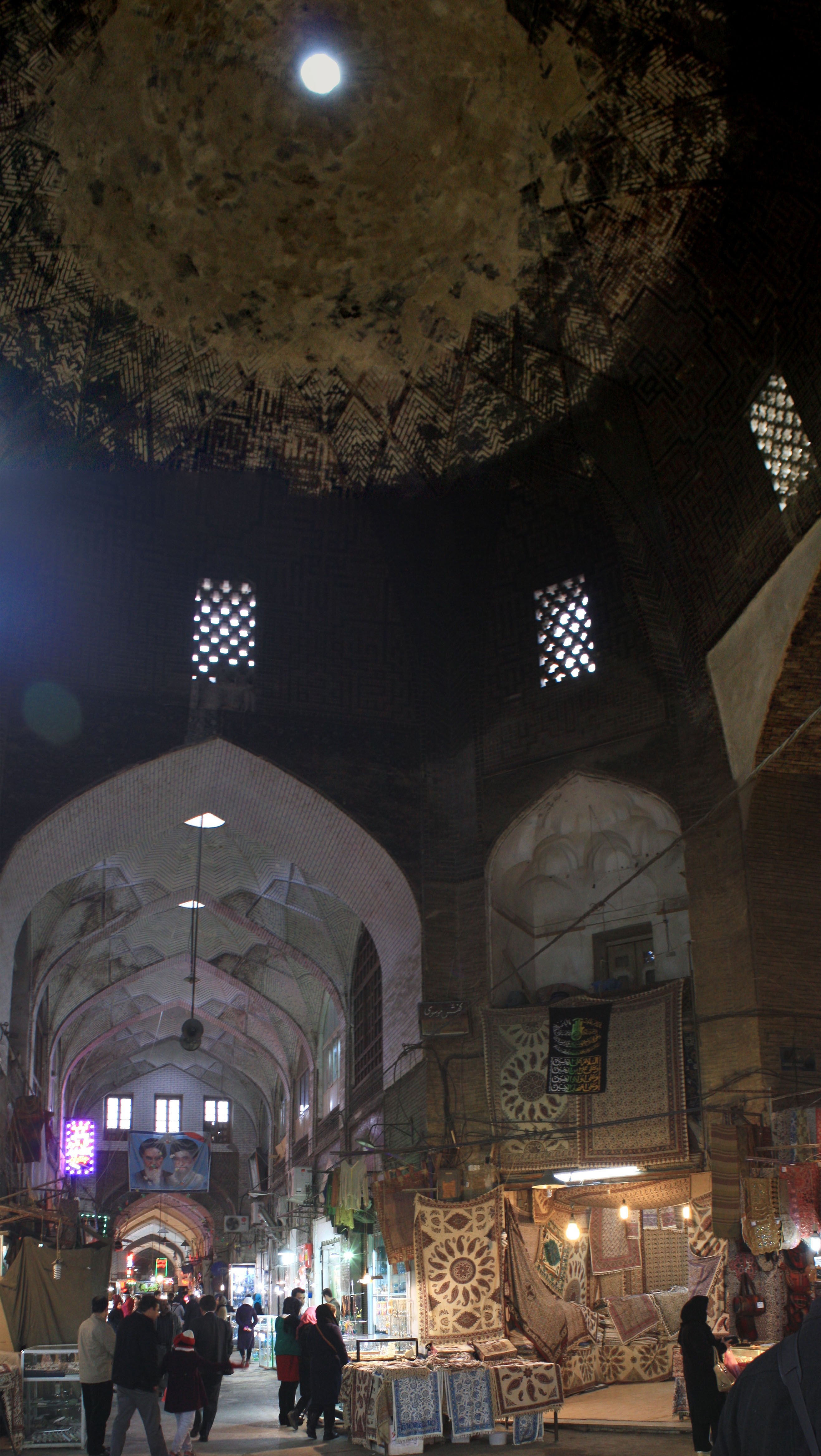 Kaisaria Bazar, Isfahan